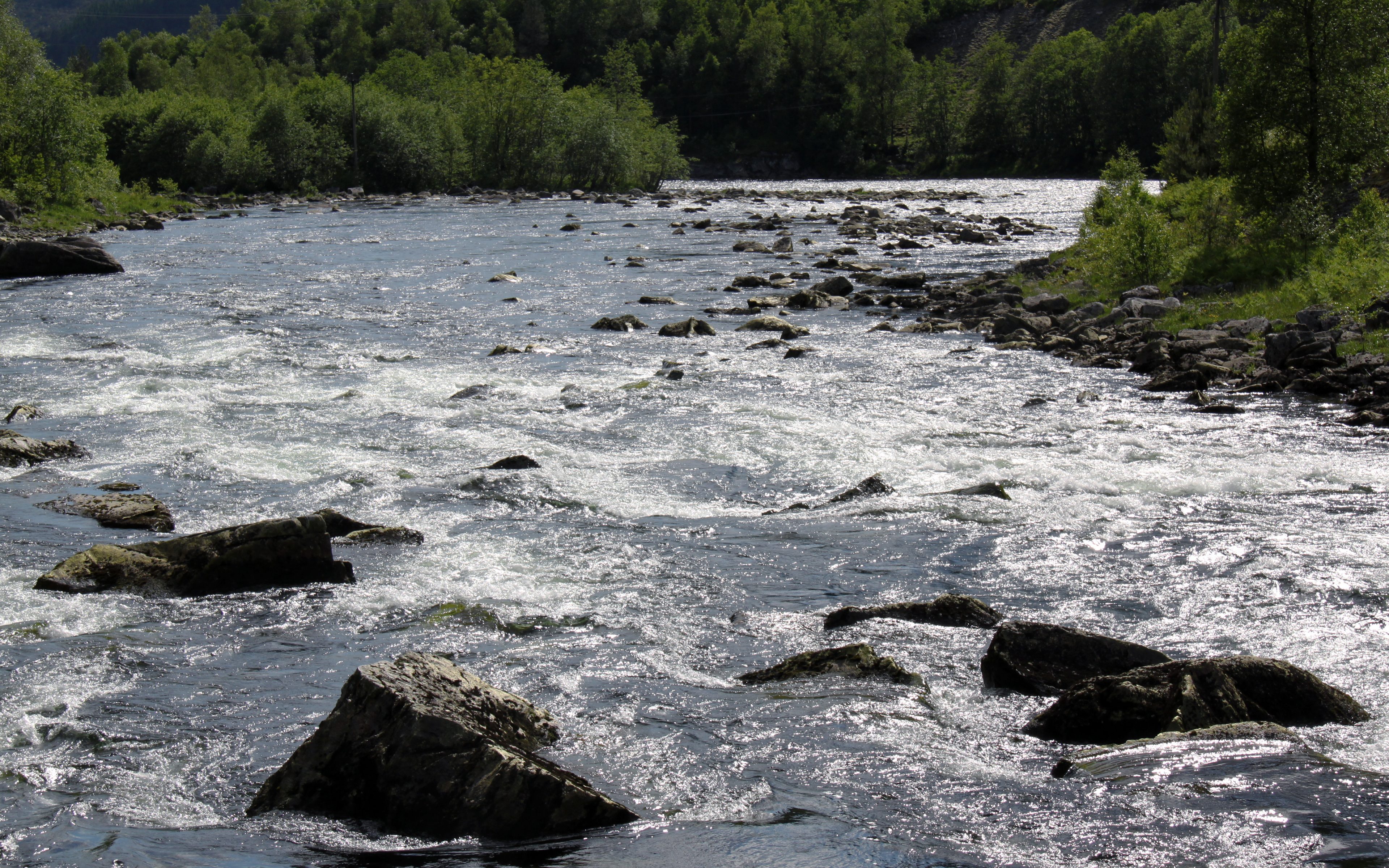 Ei elv på Eidsland oppe i Eksingedalen.